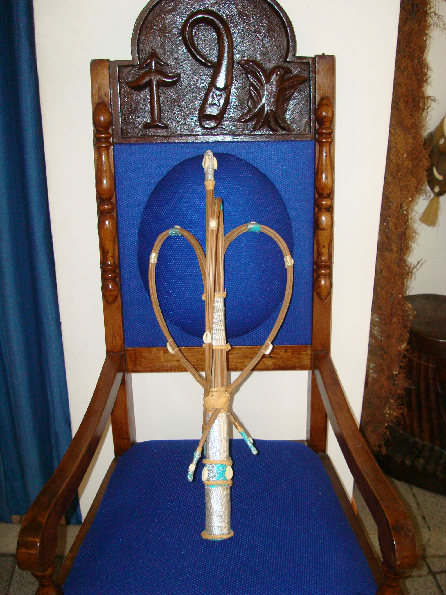 Ibiri. Objeto sagrado do Orixá Nanã. Orossi.